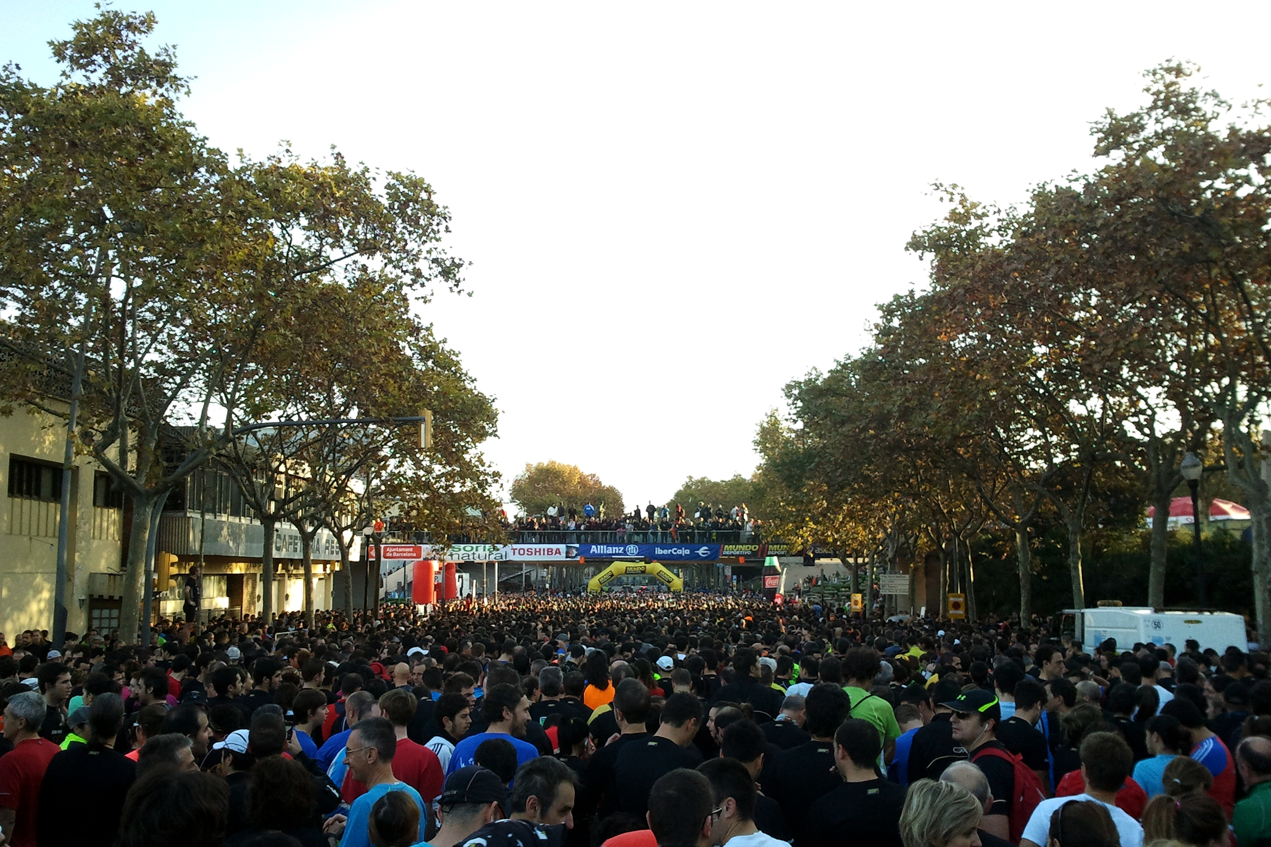 88 edición de la Carrera Jean Bouin, celebrada el 27 de noviembre de 2011 en la ciudad de Barcelona, España.